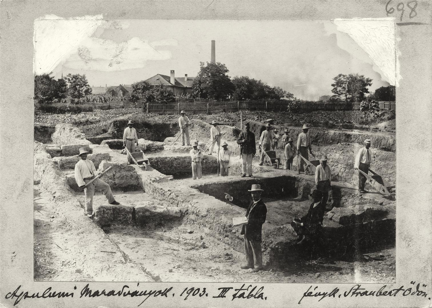 Ásatások Gyulafehérváron, az egykori Apulumban. Az előtérben Cserni Béla régész